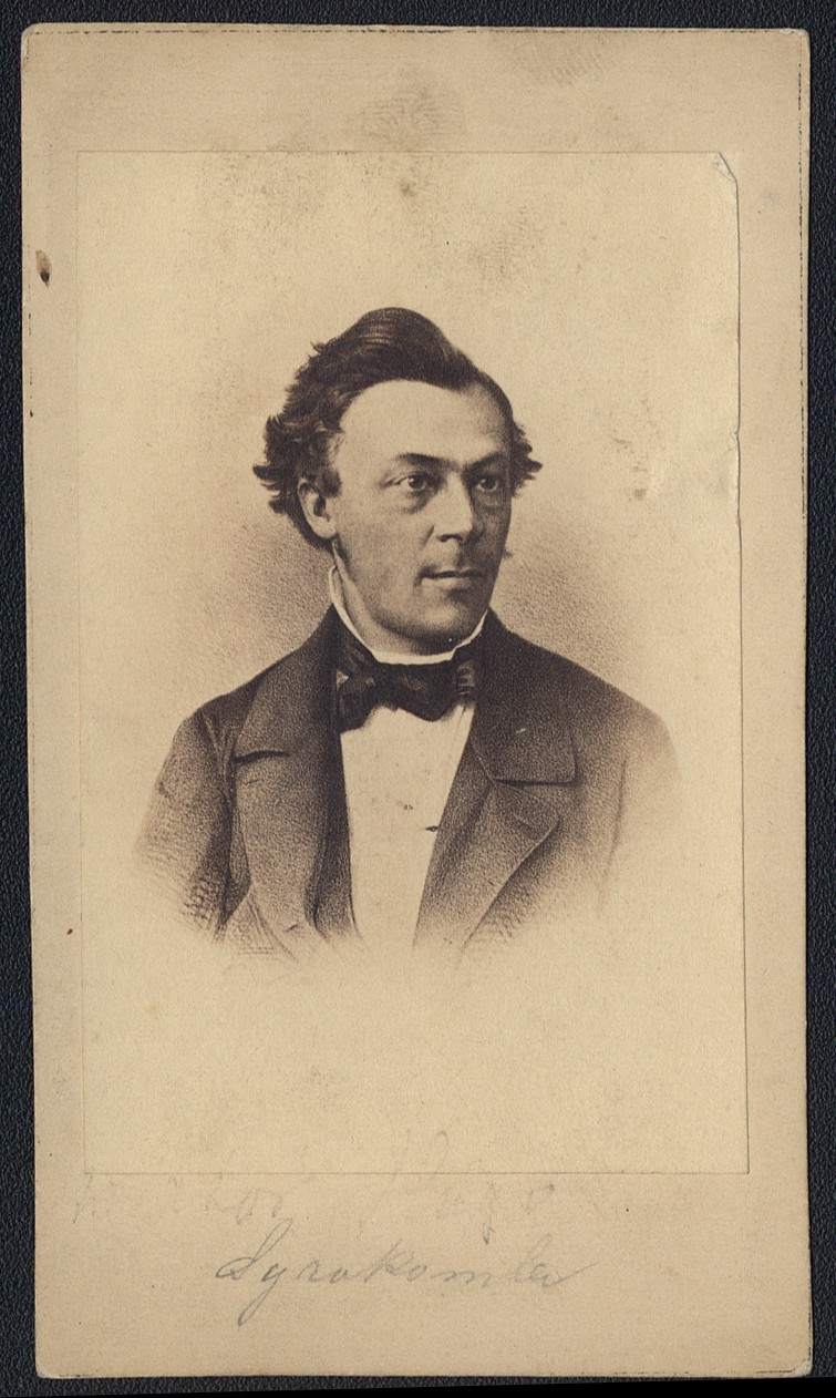 Władysław Syrokomla, portret wykonany ok. 1860 r.